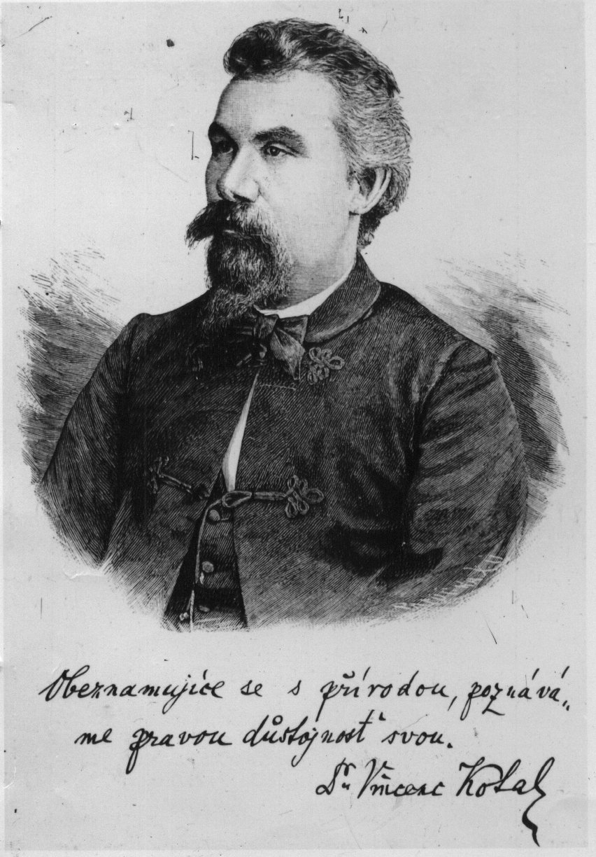 PhDr. Čeněk Kotal - přírodovědec